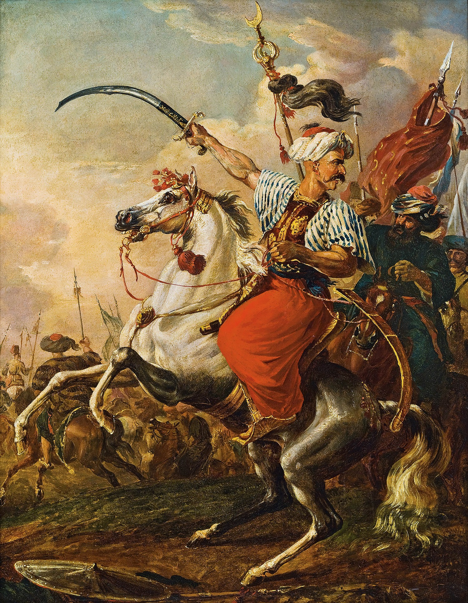 Szene aus einer Türkenschlacht. Öl auf Leinwand (doubliert) 83,5 x 66 cm Signiert im Säbel: Höchle